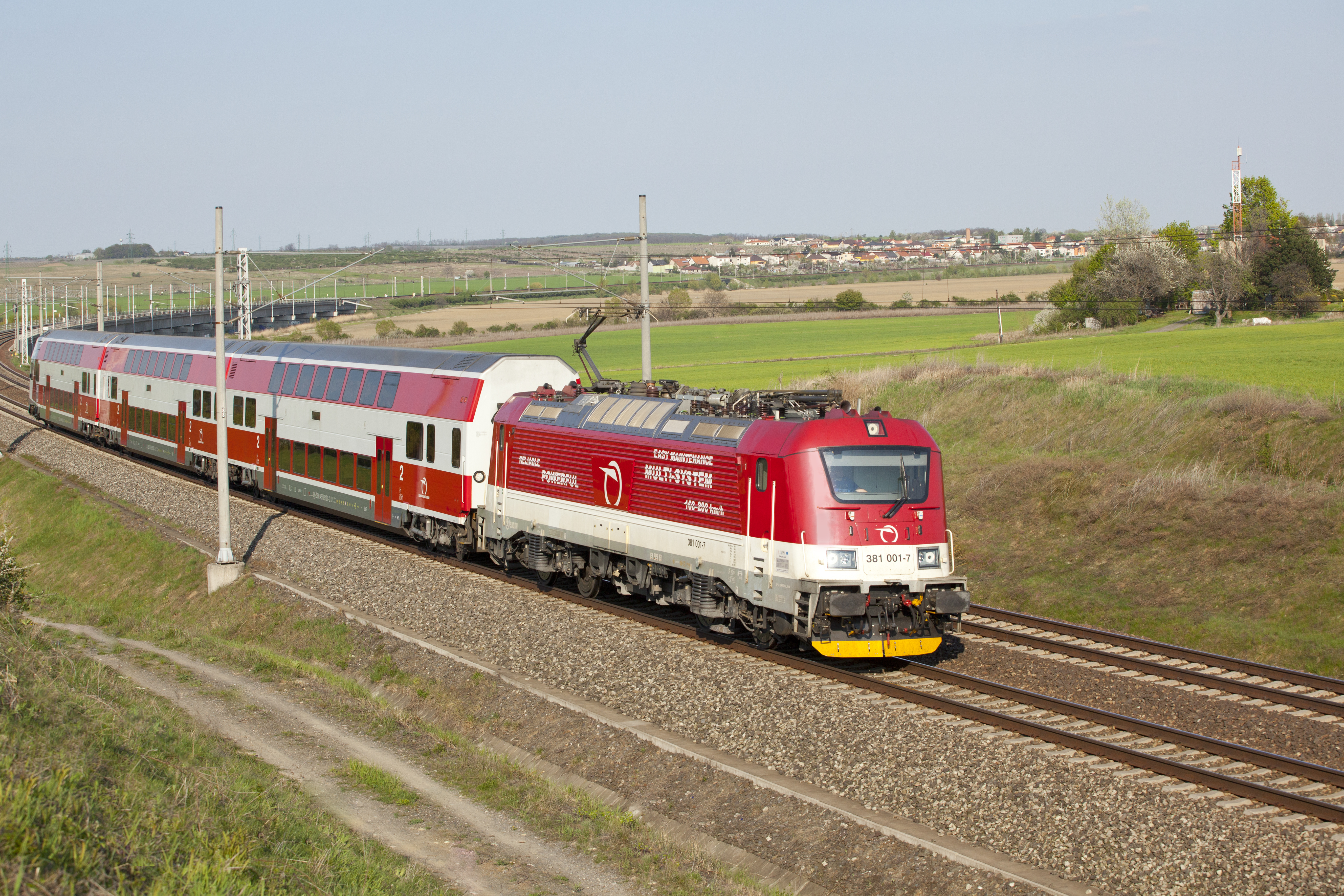 Elektrická třísystémová lokomotiva